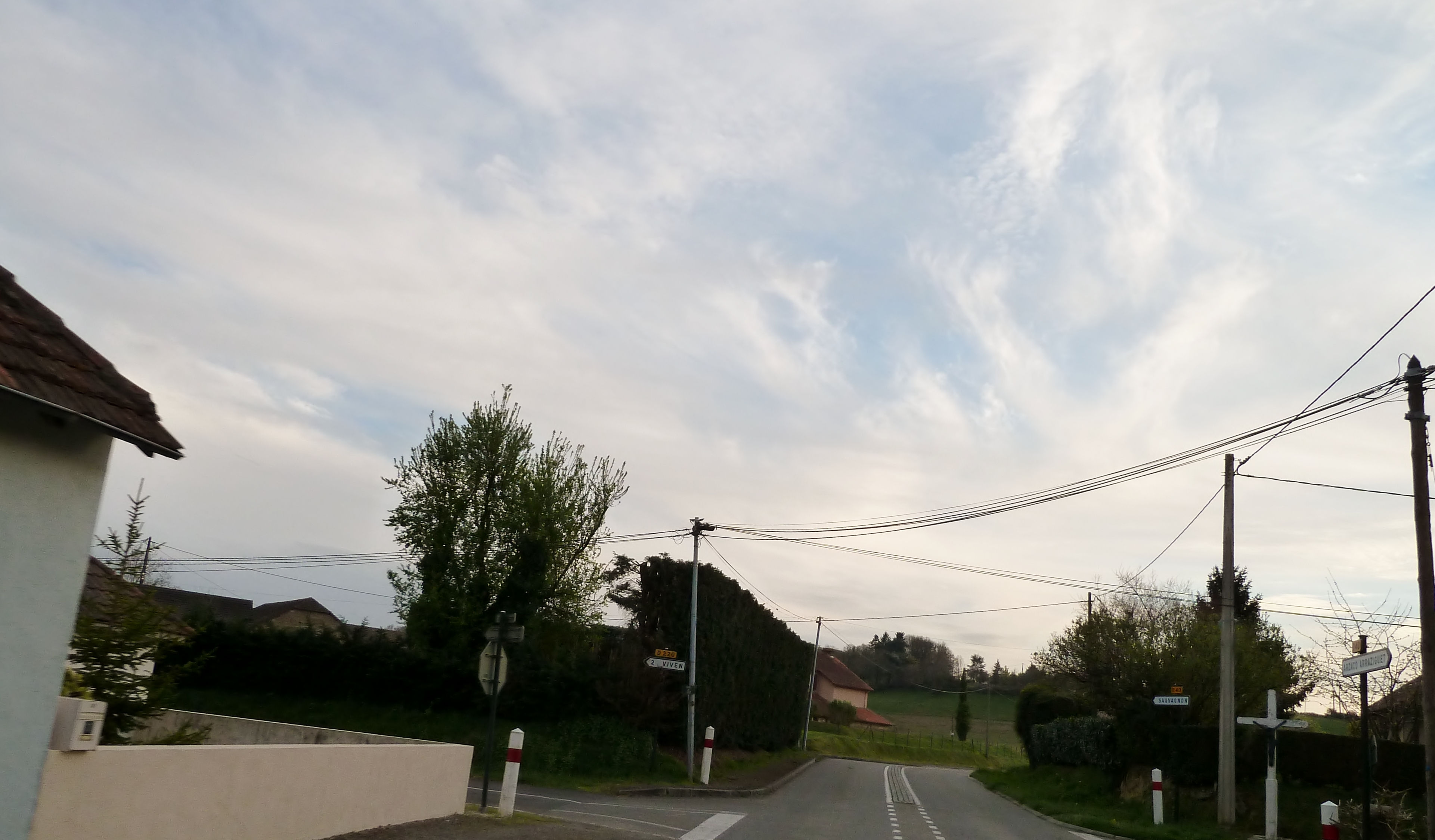 Auga